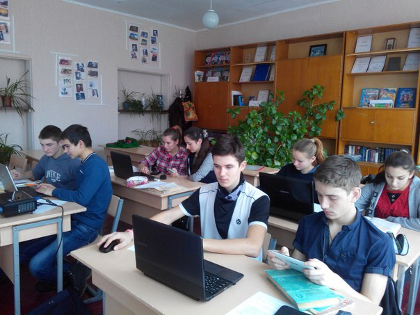 Вікі-урок в 10 класі Шендерівського НВК Корсунь-Шевченківського району Черкаської обл